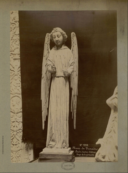 Moulage de la statue dite de l'Ange du château du Lude.